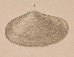 Vov. de la Coqxulle . ^:/='2.v^ Mollusques. IN l5 ^ j.llelisioa sanel;v-helena\Less. a. A. L'animal rentré d 2.0alvpl.rceaA(lolphci,Less. a.A. L'ammal vu en dessou 3.Clausilia piiiietalissxma.Less. S.A.Test de crraucleu 4.Paphies ((Vassalella) Eoissyaiia.Less. 4. A. Les dei I) . U1110 (lèpres sa, Lamk. 5. A. Les deux valves ouvertes. ii.B. L'animal .ni Irail vii eu dessu mturelle vu en dessus 3.B.Le 1 valves ouvertes . l'nkrf pmx cîapnv Les.,;,, ■ . ' 'n,,,, " lit /■"':, ■•lui . à^s^egssÉà^jSj^iâÉ^ÊÊÊM